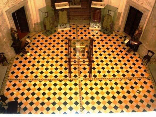 Interno della chiesa di San Gennaro in Cerreto Sannita.